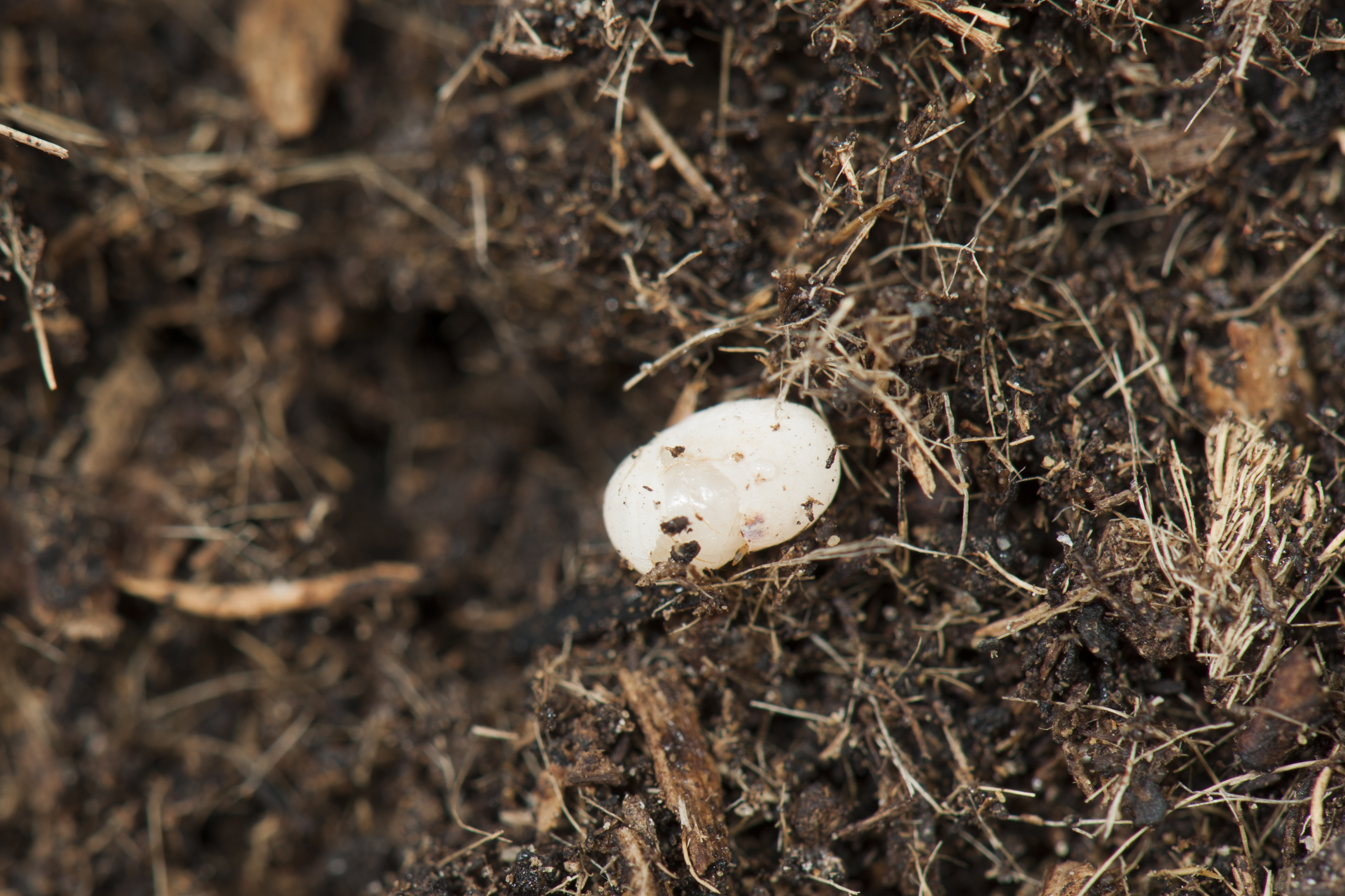 Oryctes rhinoceros (Linnaeus, 1958) 犀角金龜